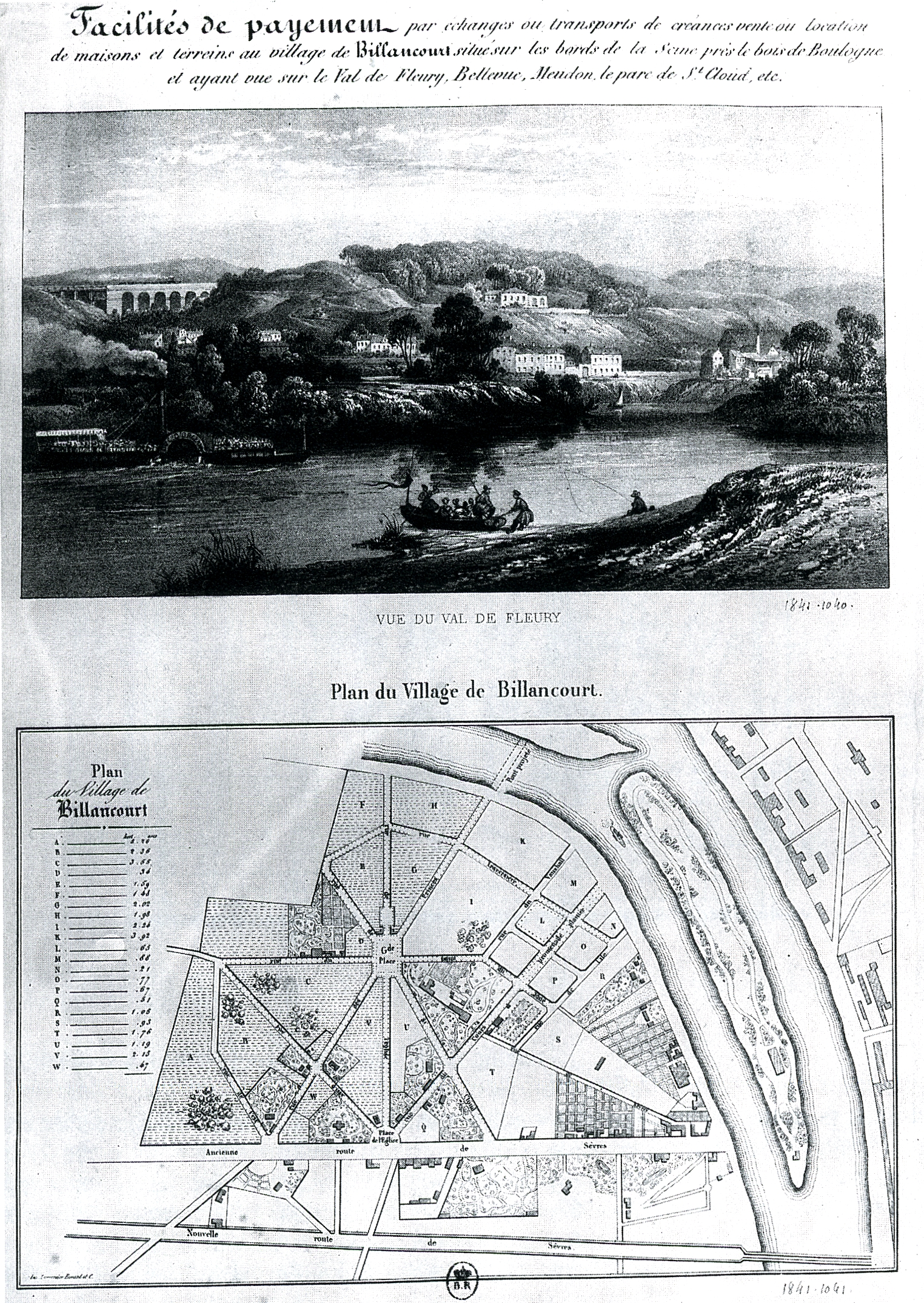 Plan du village de Billancourt. Document publicitaire de Gourcuff